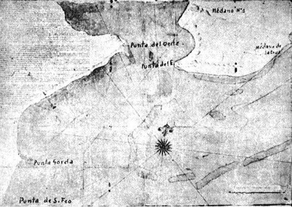 Mapa de la desembocadura del Río Negro realizado por el marino español Juan Pascual Callejas en 1780